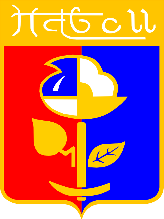 Герб города Навои утвержденный в 1987 году